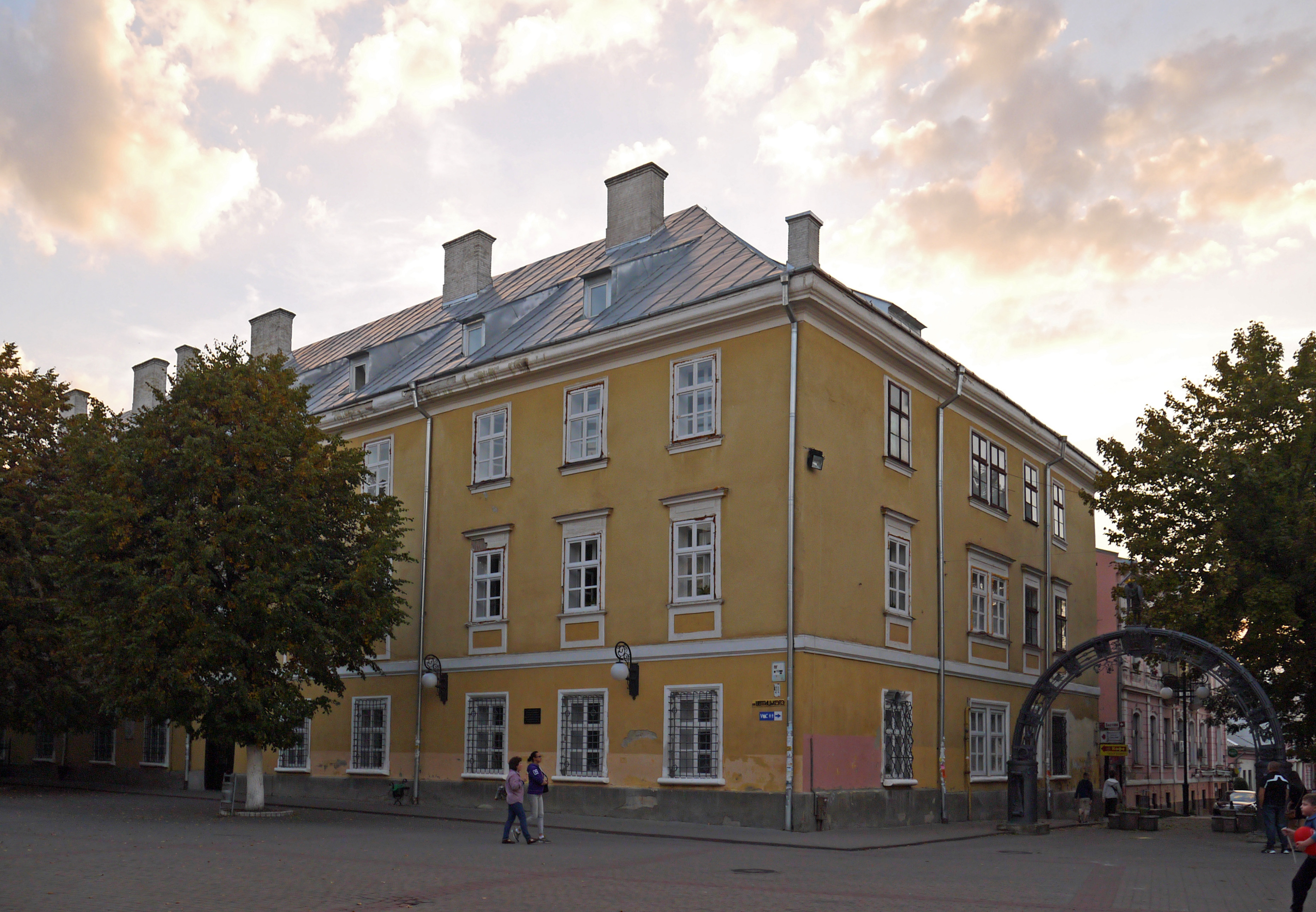 Колегія єзуїтів, а згодом гімназія, де навчалися громадські діячі та письменники Ф. Карпінський, Садок-Баронч, В. Гнатюк, А. Могильницький, В.Навроцький, О. Терлецький, М. Яцків, Д. Лукіянович, Івано-Франківськ, Майдан Шептицького, 21